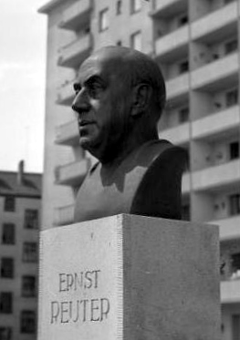 Stadtaufnahmen Berlin Stadtaufnahmen Berlin